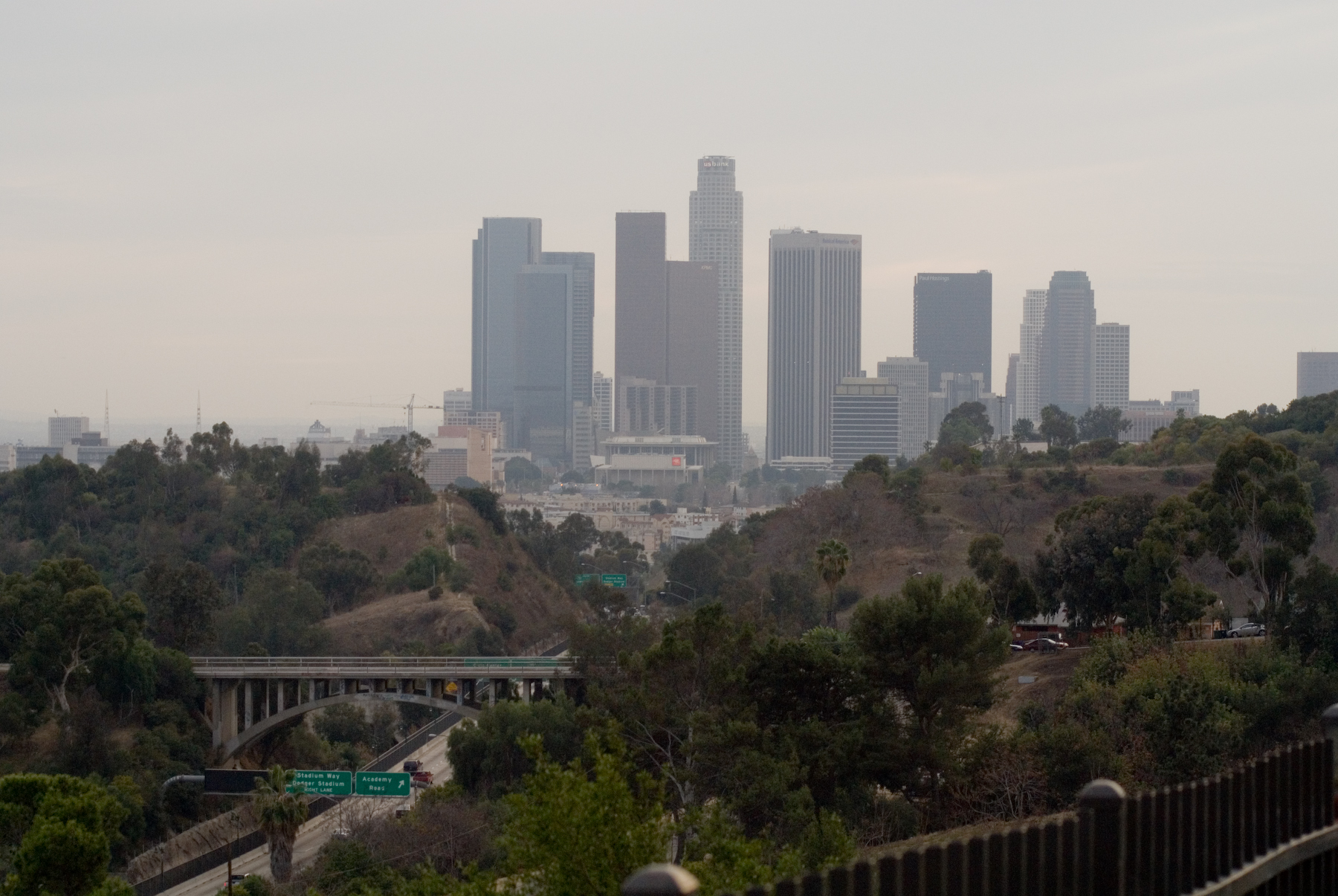 Angelino Heights, Bunker Hill and Elysian Park